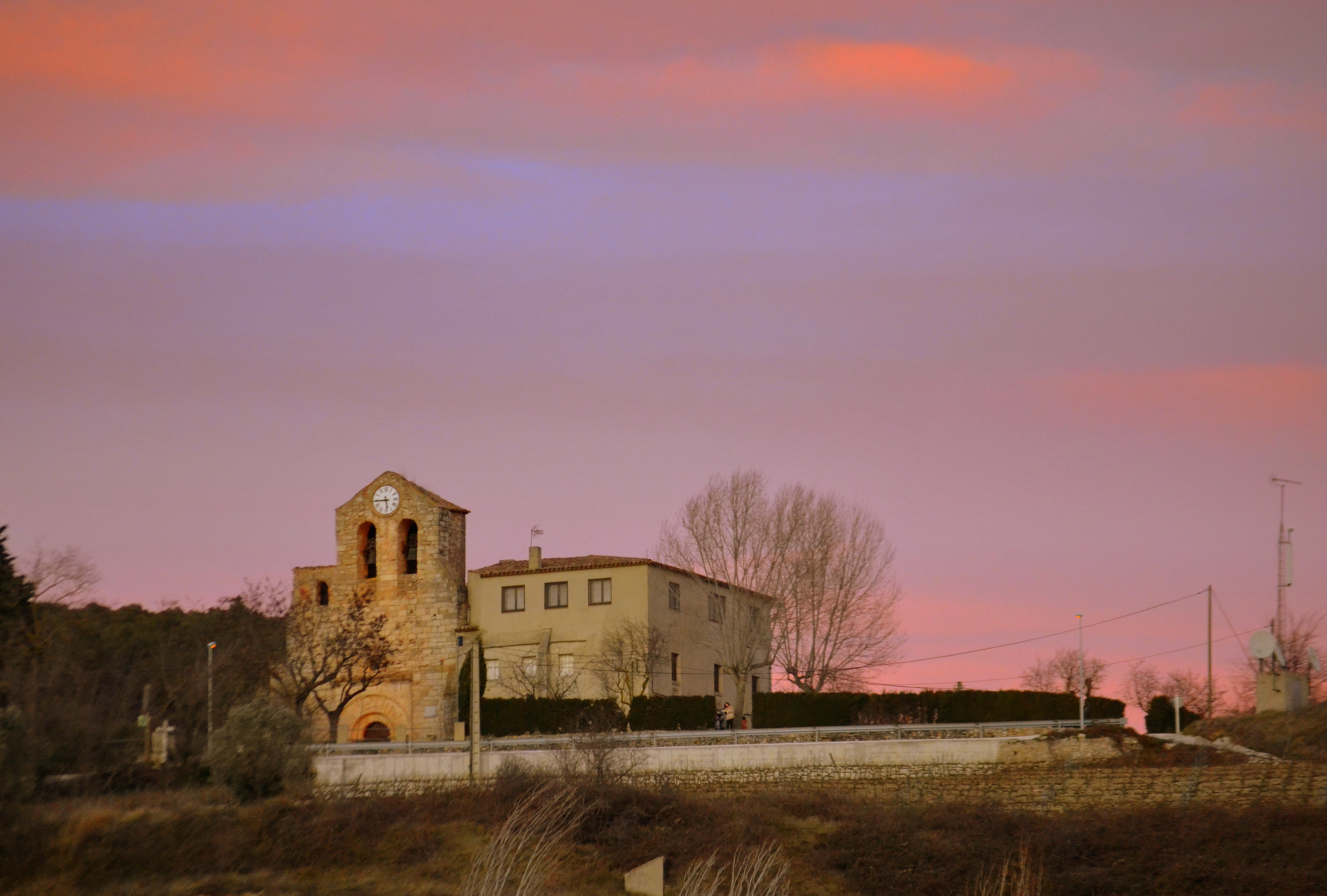 Església parroquial de Santa Magdalena (Pontons)